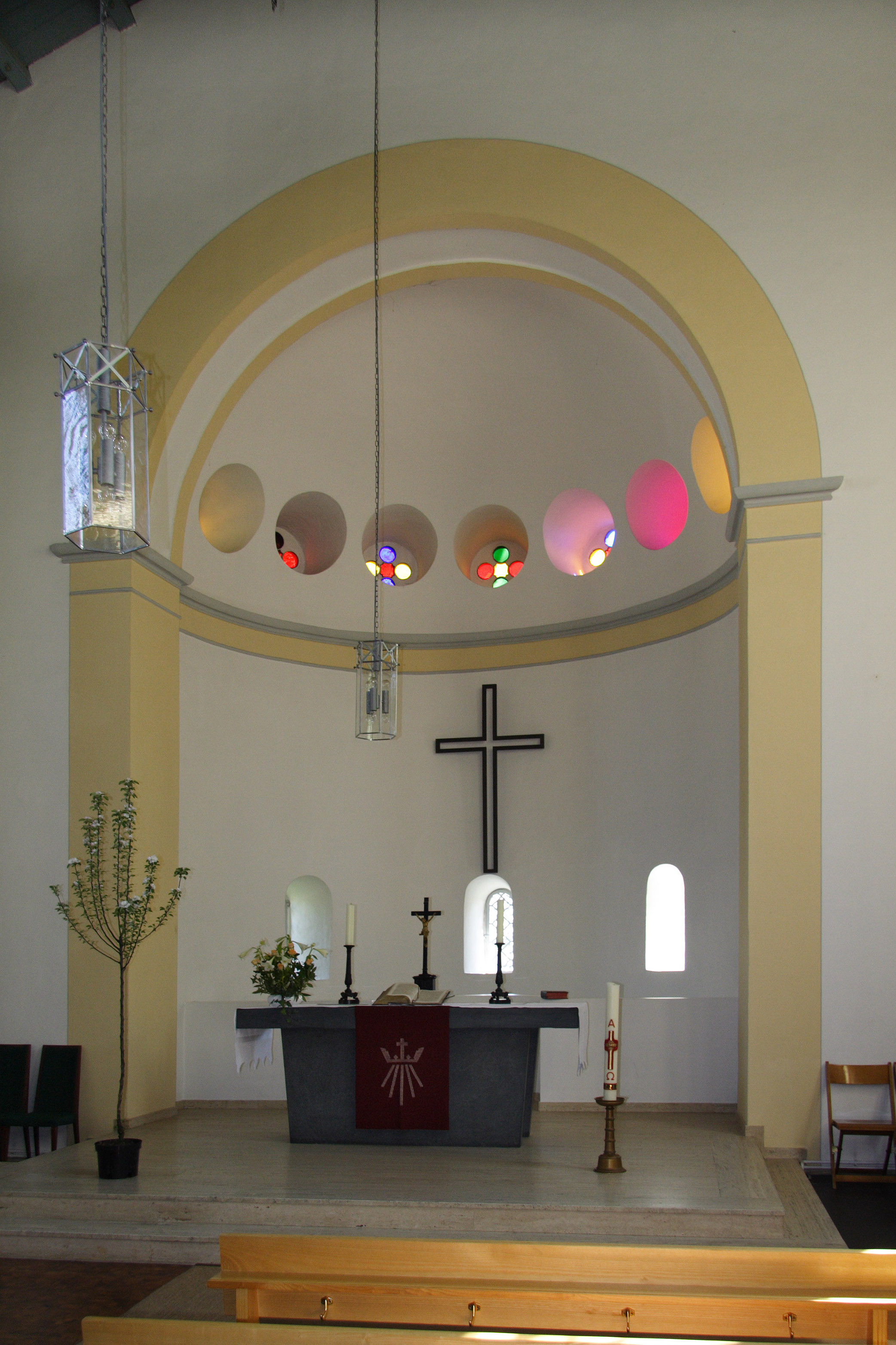 Chor der evangelischen Stadtkirche in Brilon